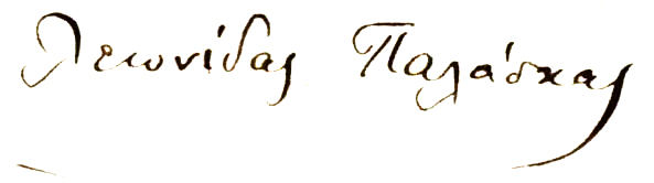 Υπογραφή του Λεωνίδα Παλάσκα από επιστολή του προς τον Ιωάννη Κωλέττη του 1838 (όταν ήταν 19 ετών)